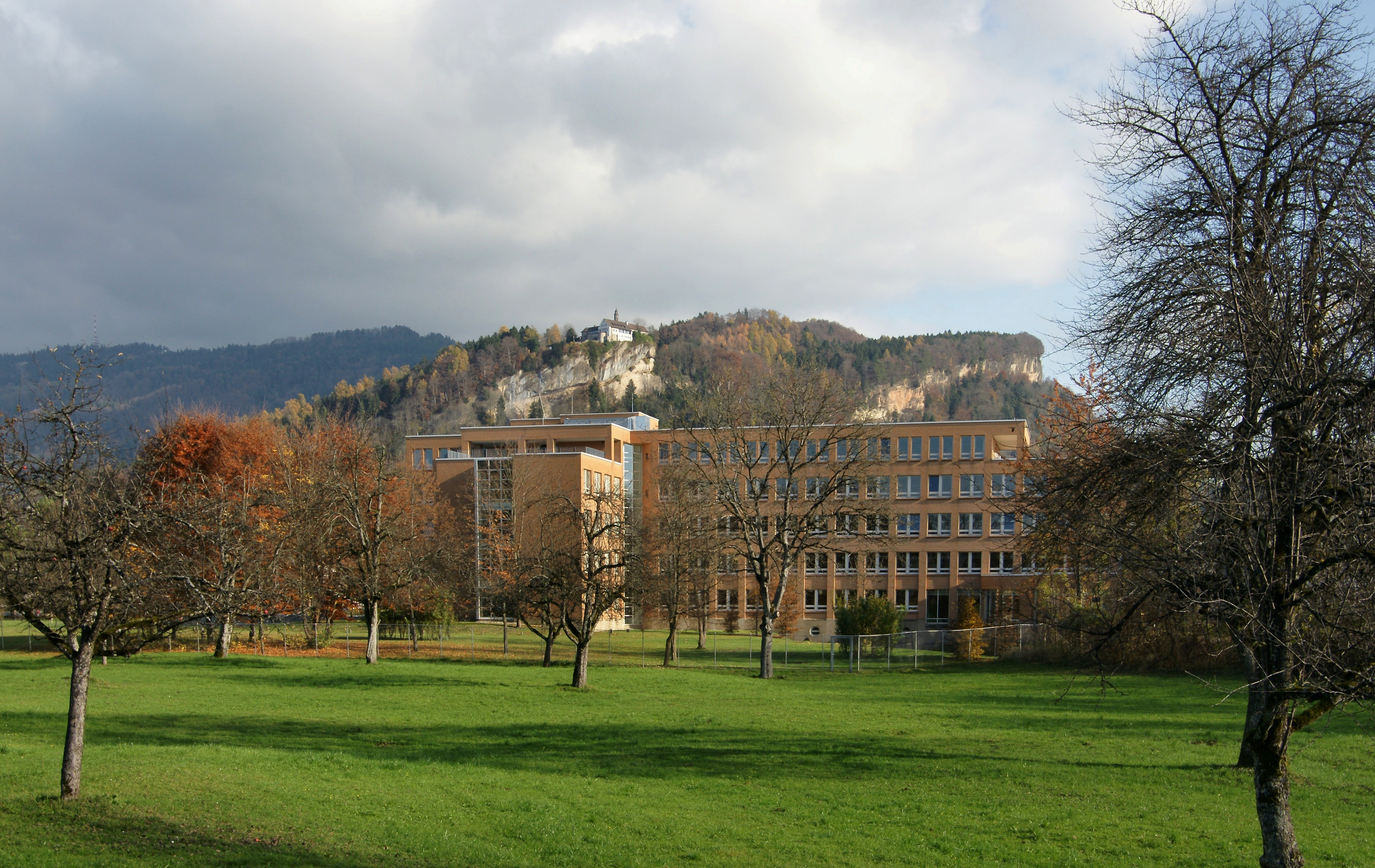 Die Vorarlberger Kraftwerke Aktiengesellschaft (VKW) ist ein Energieversorgungsunternehmen im österreichischen Bundesland Vorarlberg. Mit rund 170.000 Kunden in ganz Vorarlberg und dem Westallgäu ist sie der größte Stromverkäufer der Region. Im Bild ein Verwaltungsgebäude in Bregenz Weidach. Im Hintergrund die Burg Hohenbregenz auf dem Gebhardsberg.